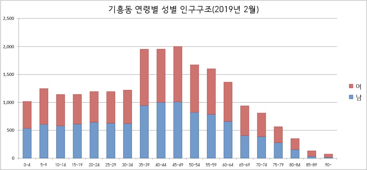 기흥동 연령별 성별 인구구조